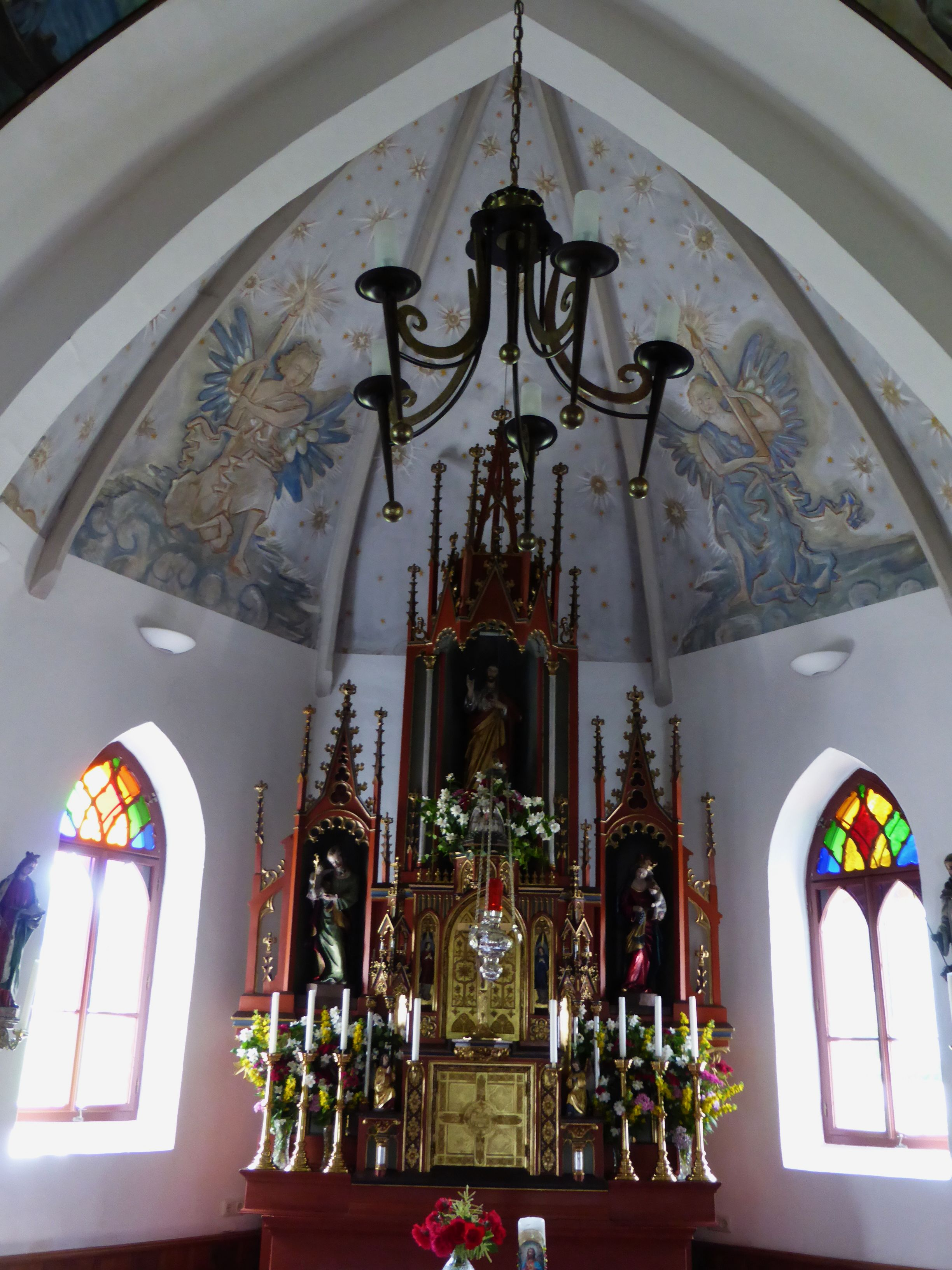 Kapelle Herz Jesu und hl. Leonhard (Kapelle in Stocker, Radochsbergkirchlein)